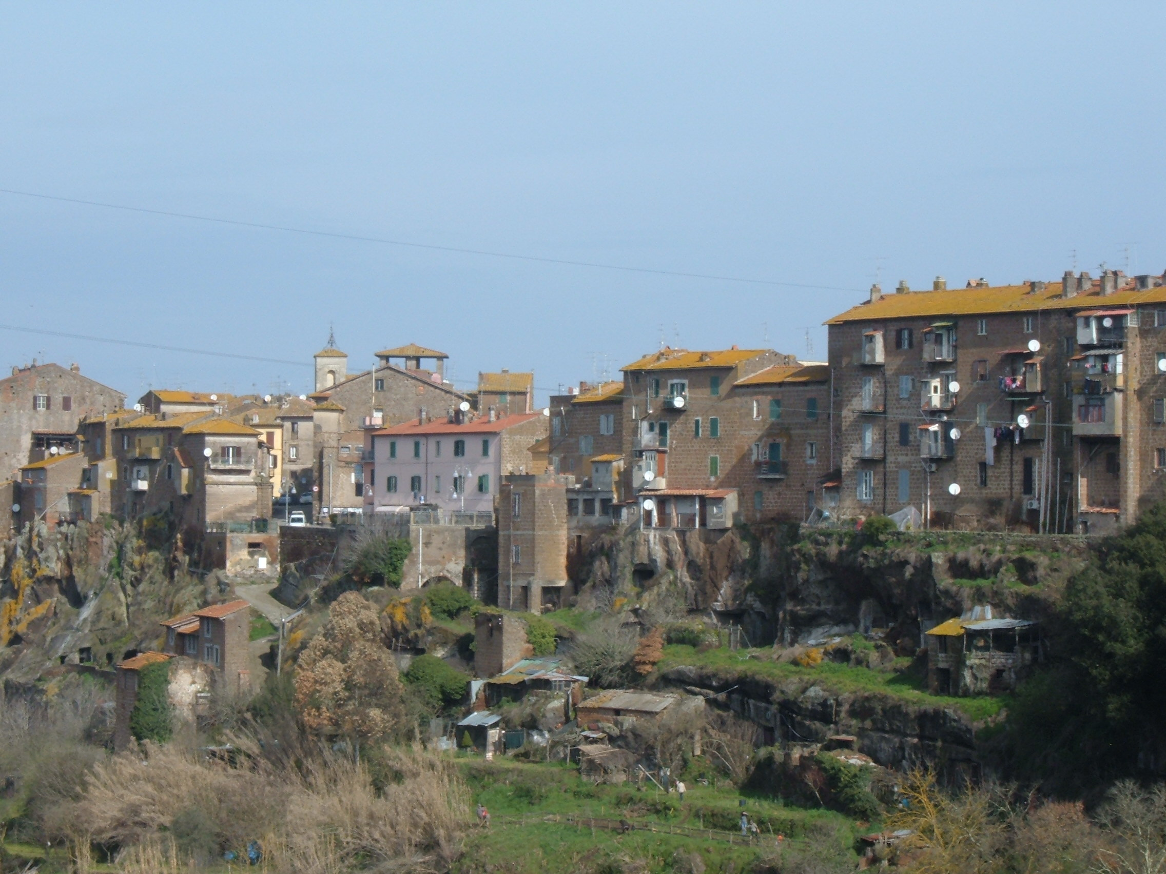 Panorama di Blera (Viterbo)